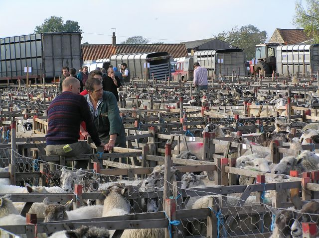 Sheep sale at Fadmoor